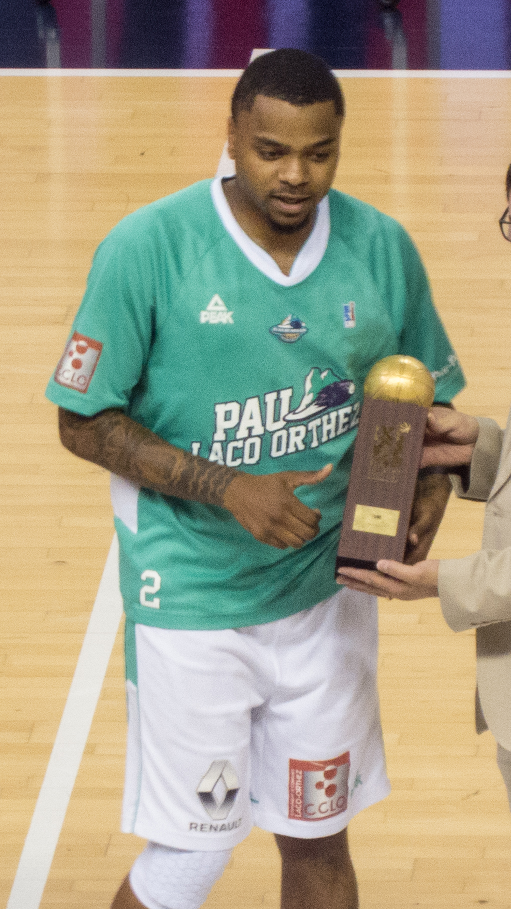 2016–17 Pro A season — 24 May 2017, Palais des Sports de Pau. Match between: Élan Béarnais Pau-Lacq-Orthez — Strasbourg Illkirch-Graffenstaden Basket